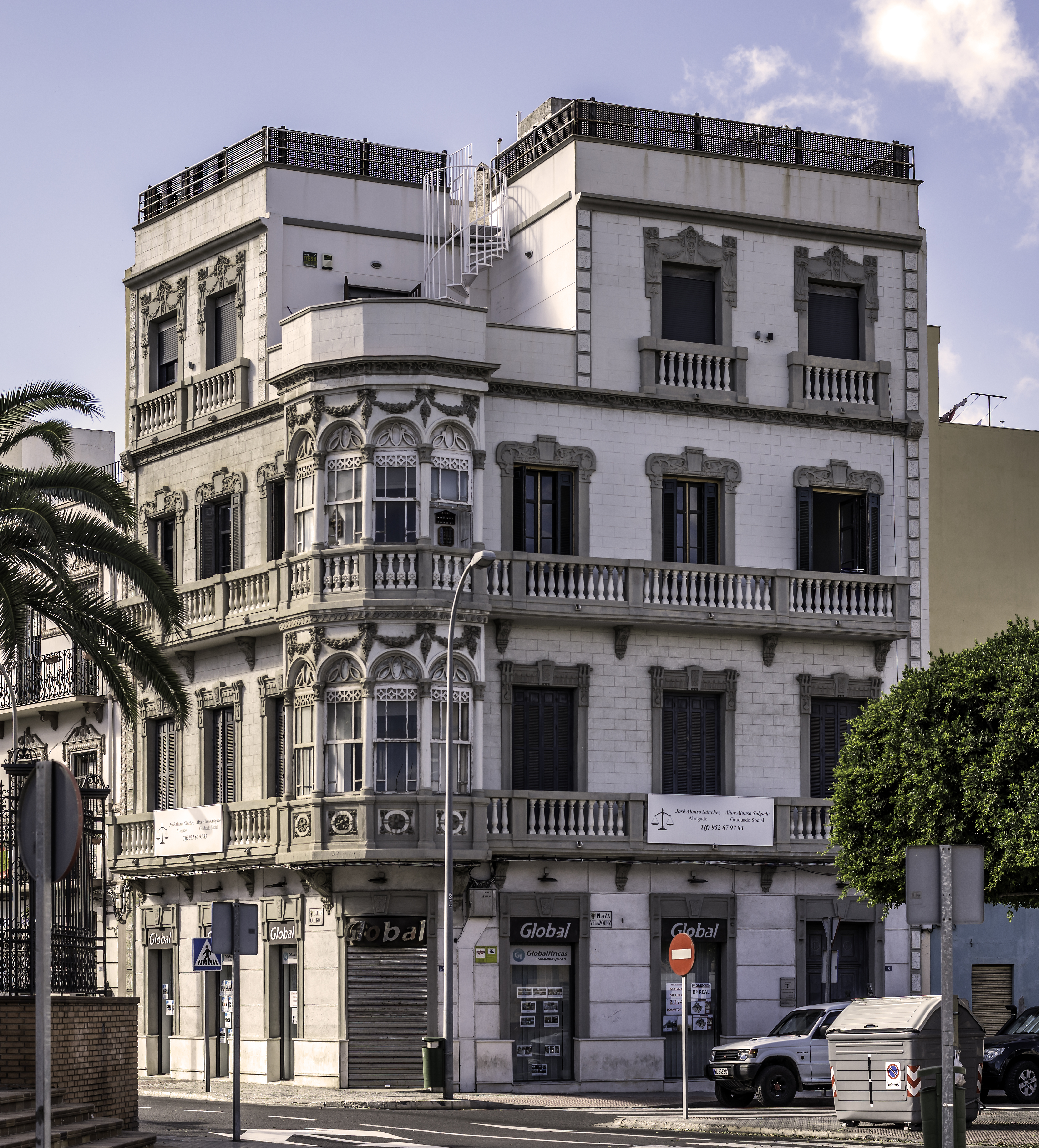 La Casa de Francisco Fernández López, es un edificio modernista del Ensanche Modernista de la ciudad española de Melilla. Está situado la Plaza de Velázquez y forma parte del Conjunto Histórico Artístico de la Ciudad de Melilla, un Bien de Interés Cultural.